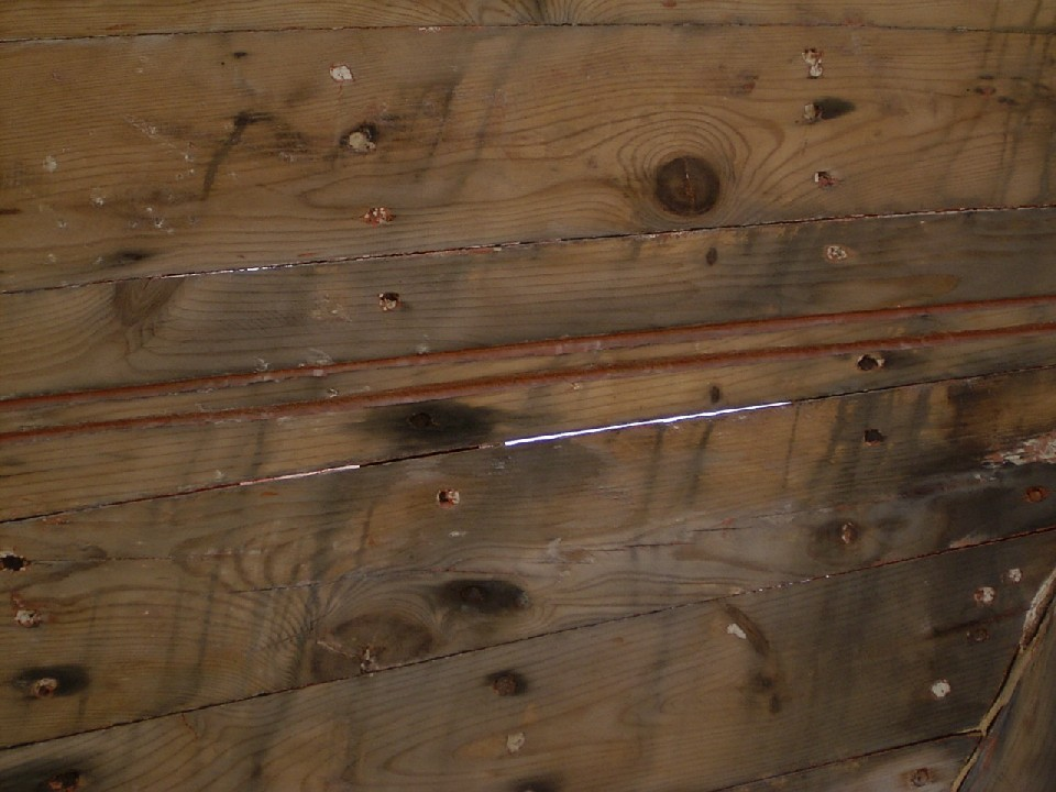 Kraweelbeplankung eines alten kretischen Fischerbootes